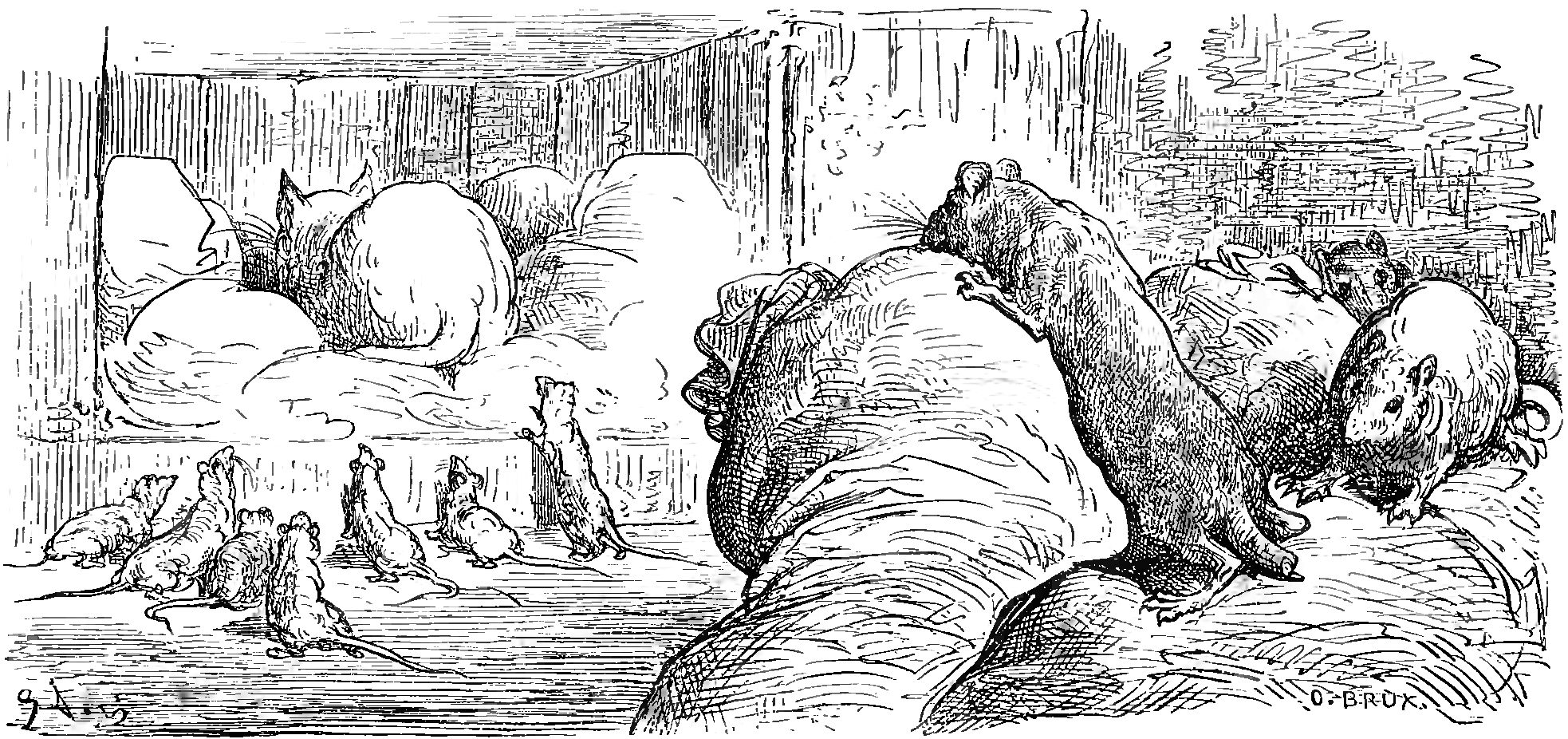 grafika z książki PL Bajki, Jean de La Fontaine, nakładem i drukiem Jana Noskowskiego, Warszawa 1876